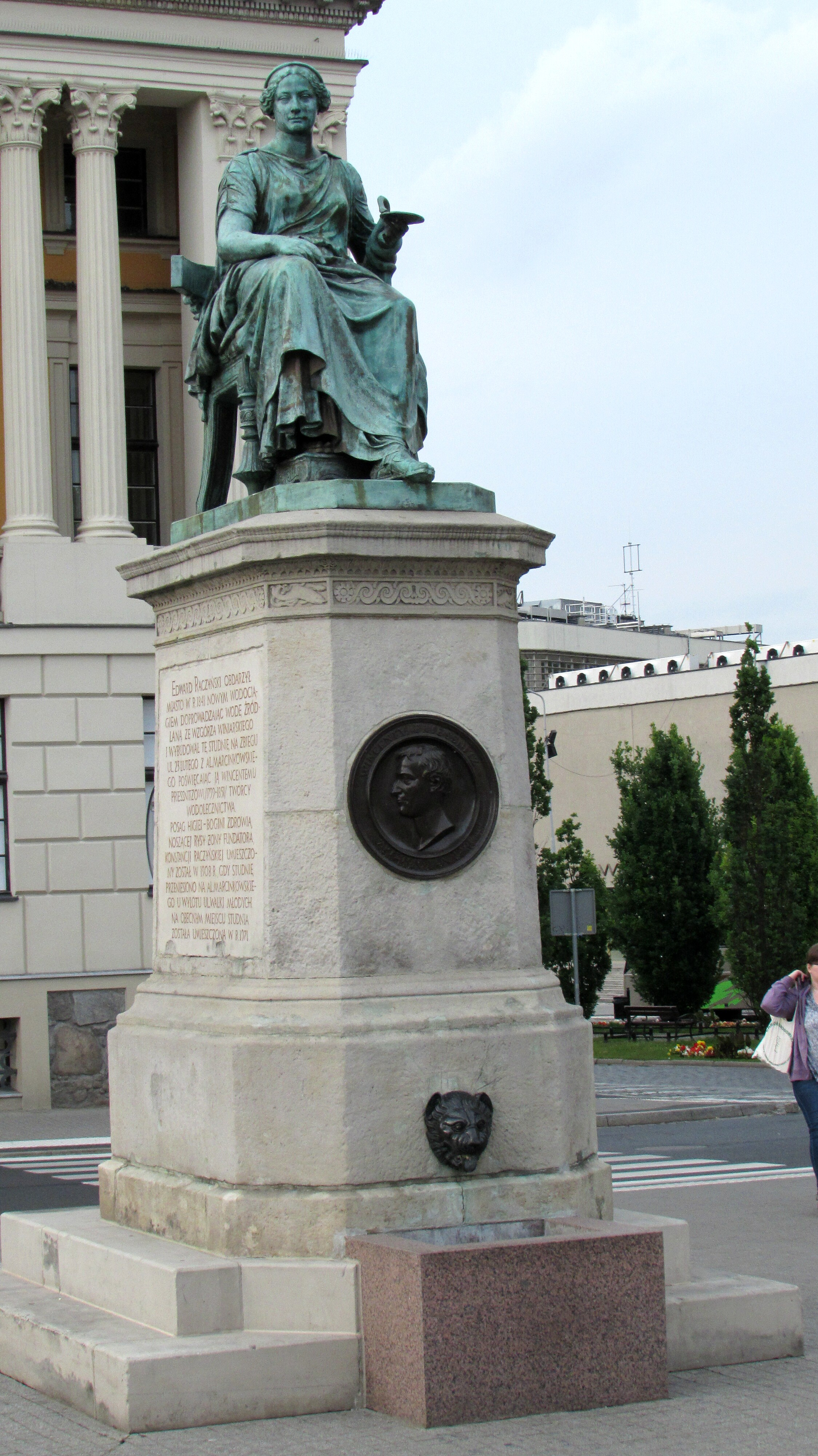 Posen Edward Raczynski Denkmal